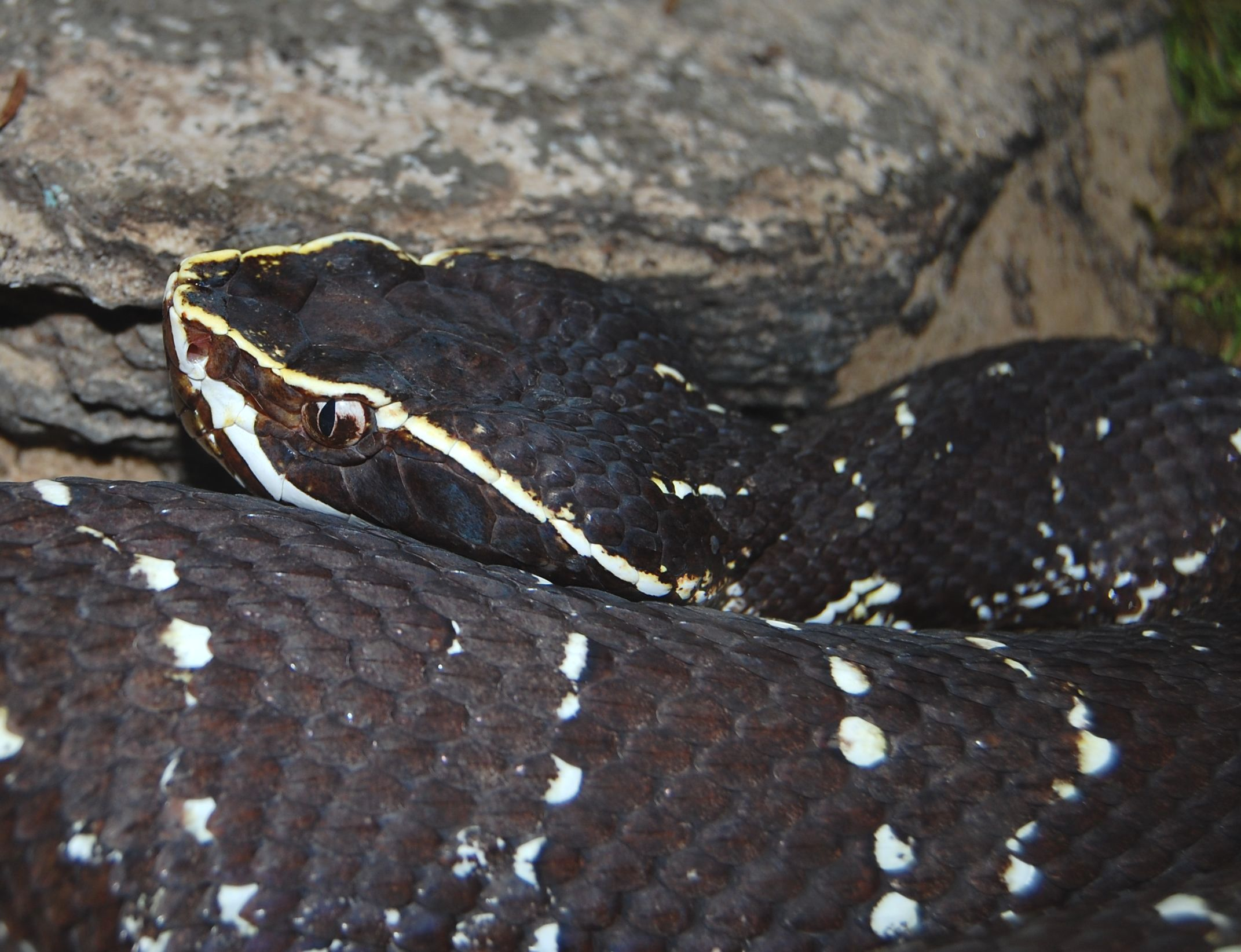 Agkistrodon bilineatus bilineatus. Aufnahme entstand in Gefangenschaft